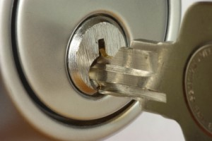 Zamek do drzwi